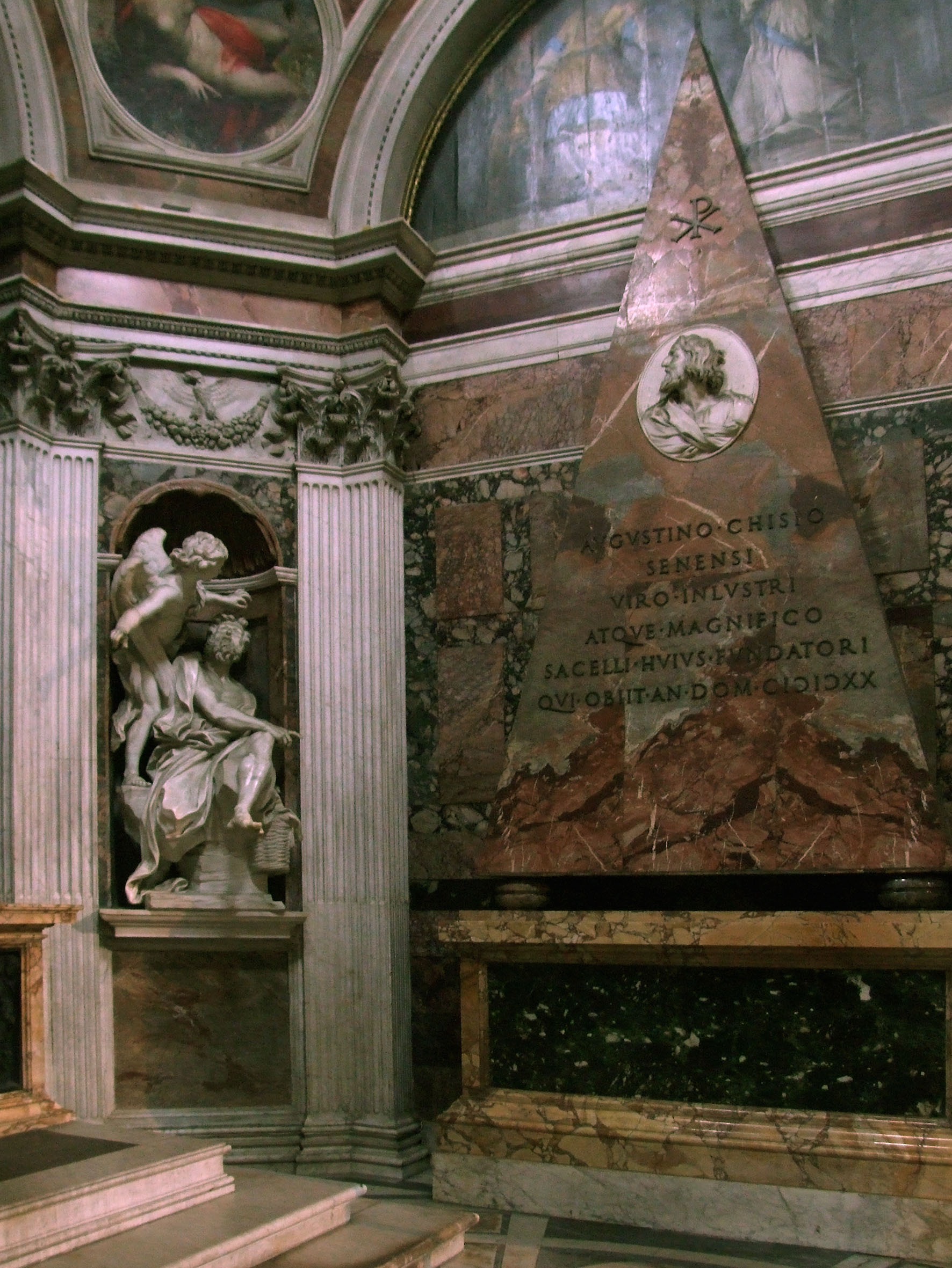 Santa Maria del Popolo, Capella Chigi, Roma